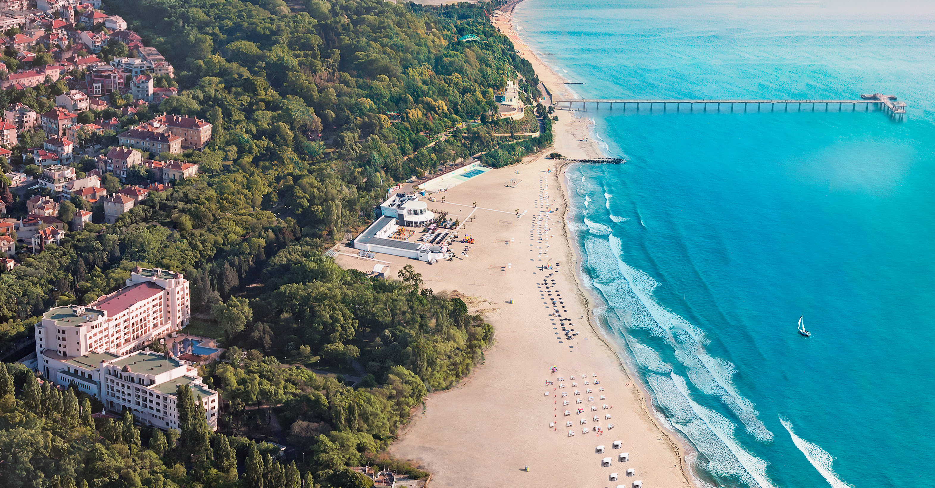 Хотелът от птичи поглед